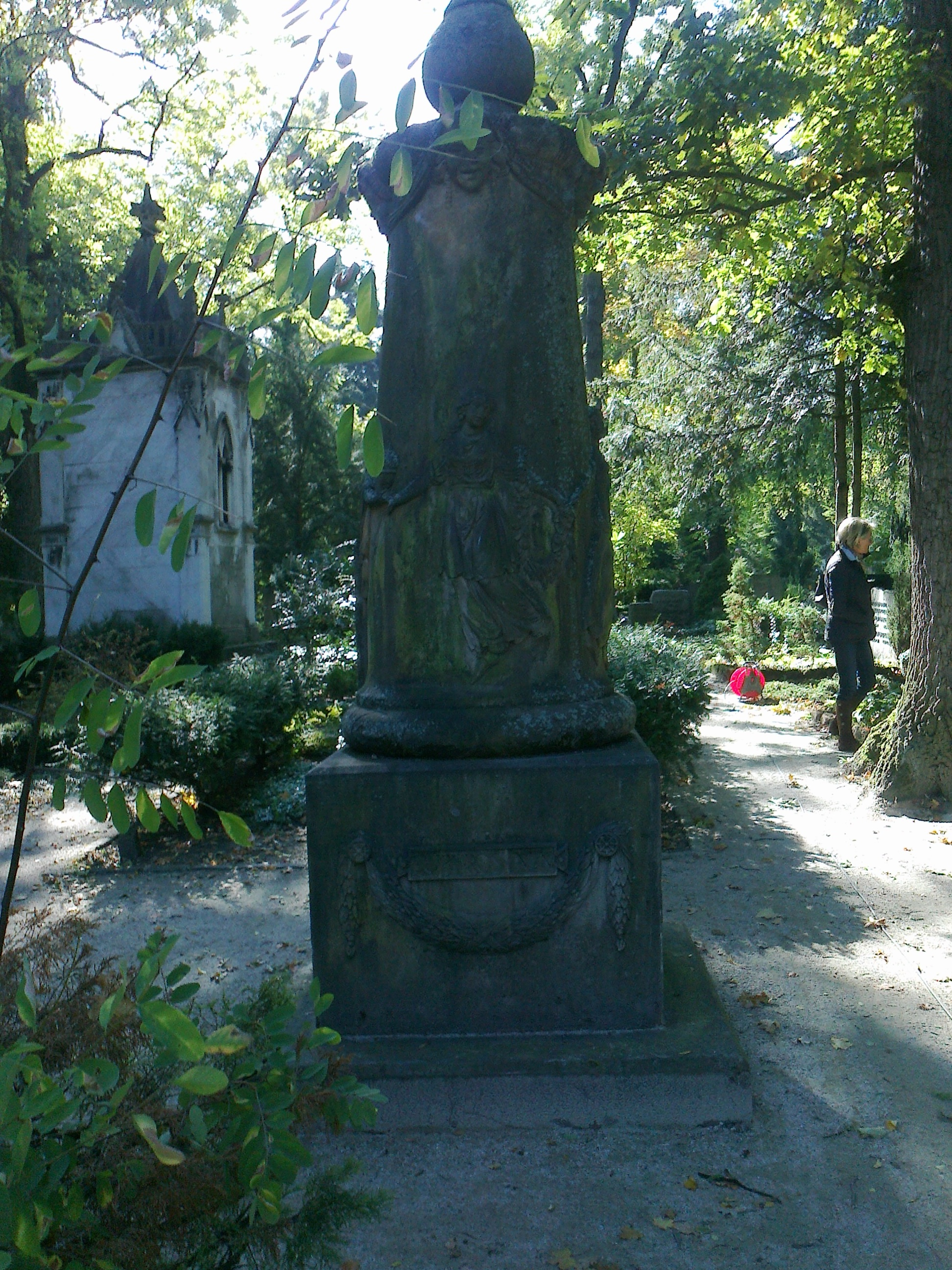 Grabsäule für Christiane Becker-Neumann